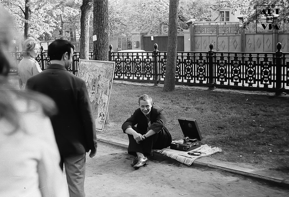 Александр Попов в московской выставке предстает не только как живописец, но и как художник, разрабатывающий жанр акции или художественного действа.